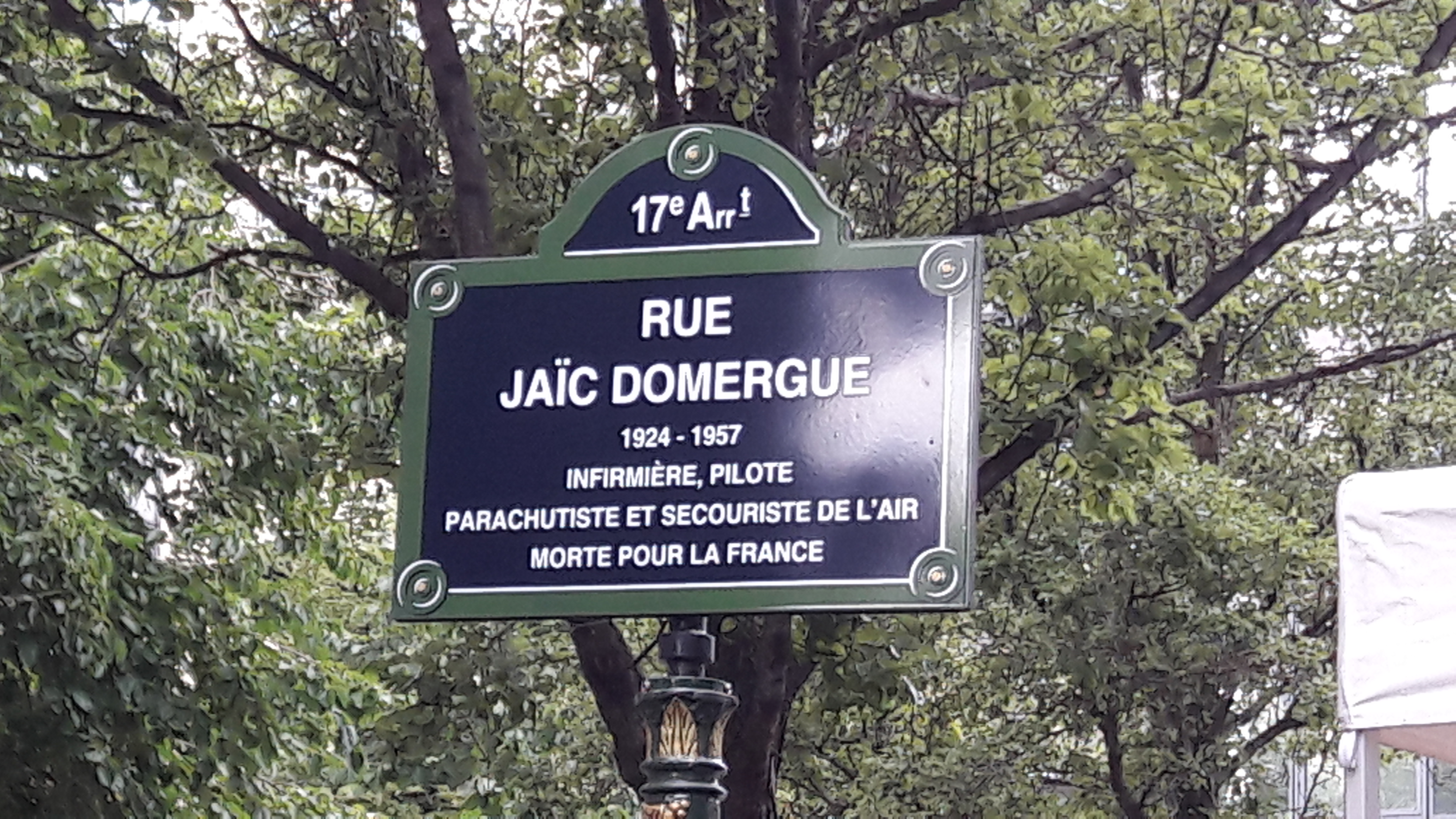 Inauguration de la rue Jaïc Domergue à Paris (plaque) le 5 juillet 2018.